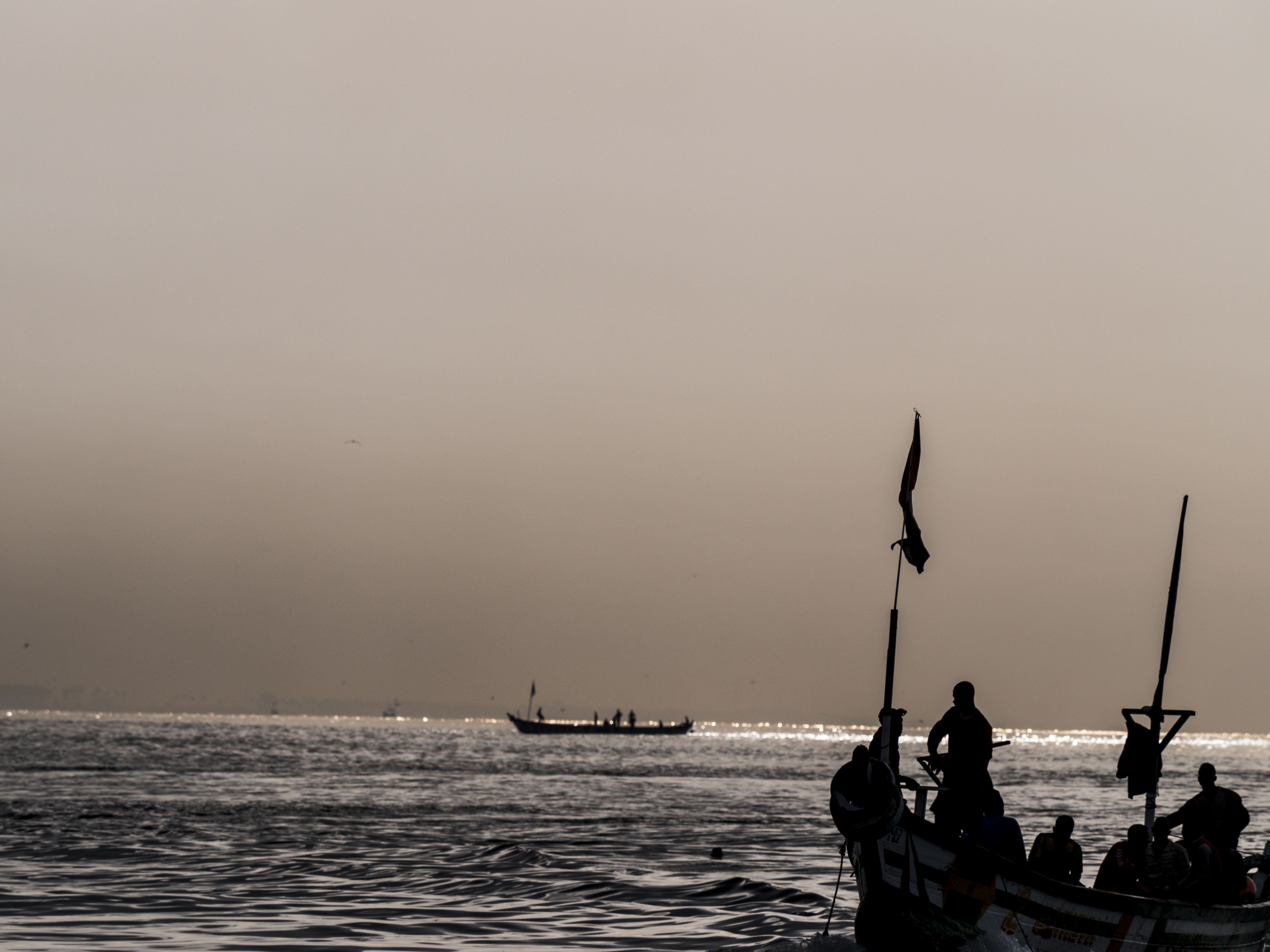 Une pirogue de pêcheur, très tôt le matin en Côte d'Ivoire. J'ai pris cette photo pendant la période des vents de l'Harmattan, à quelques kilomètres de la côte, dans l'Atlantique. L'air y est chargé en grains de sable en provenance du Sahara. Ces pêcheurs sortent parfois plusieurs jours en mer sans revenir chez eux, et pêchent une grande variété de poissons: coryphènes, wahoo, thons, carangues et parfois même marlins. This is an image with the theme "Africa on the Move or Transport" from: Ivory Coast